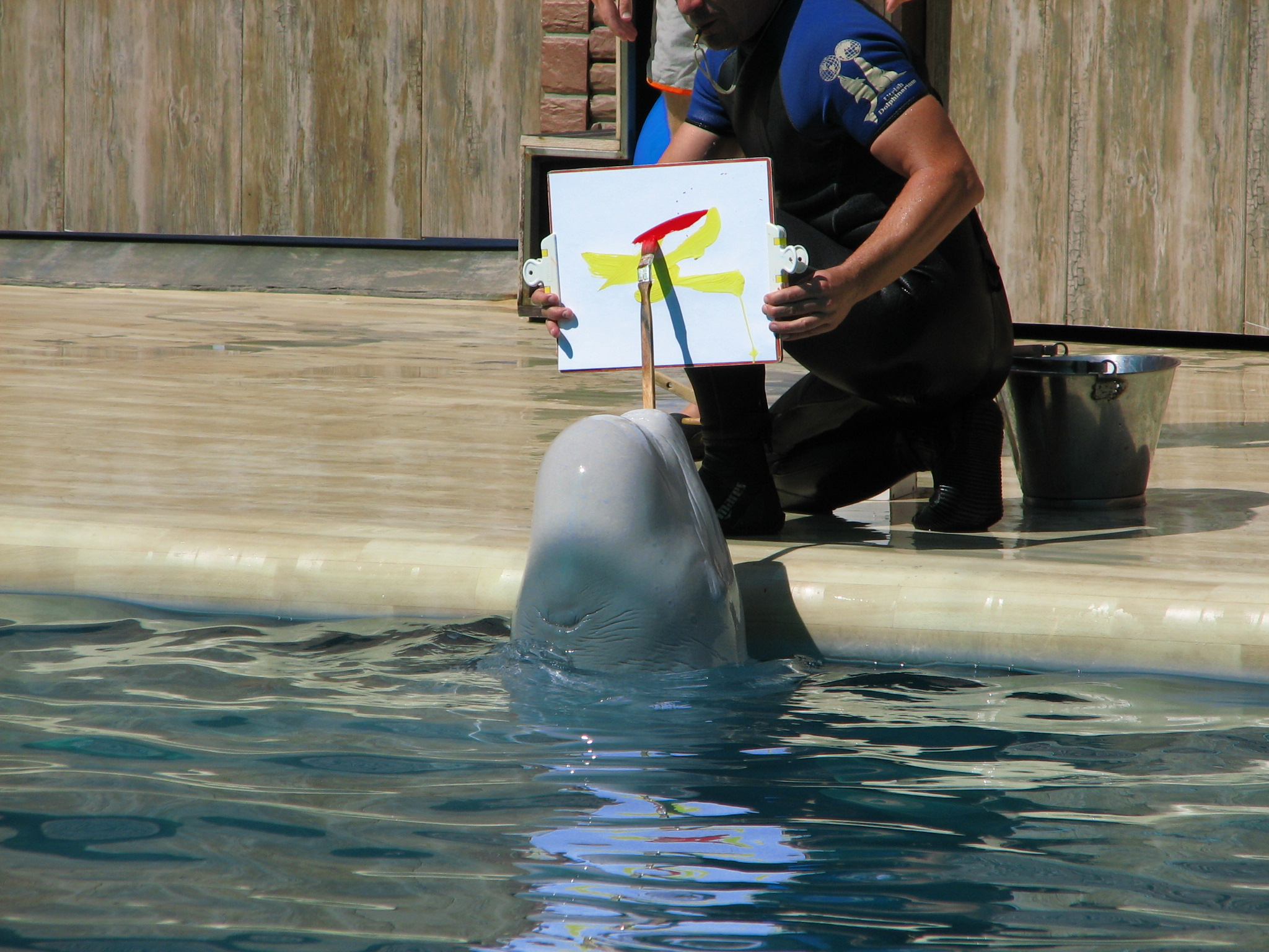 Утришский дельфинарий. Адлер